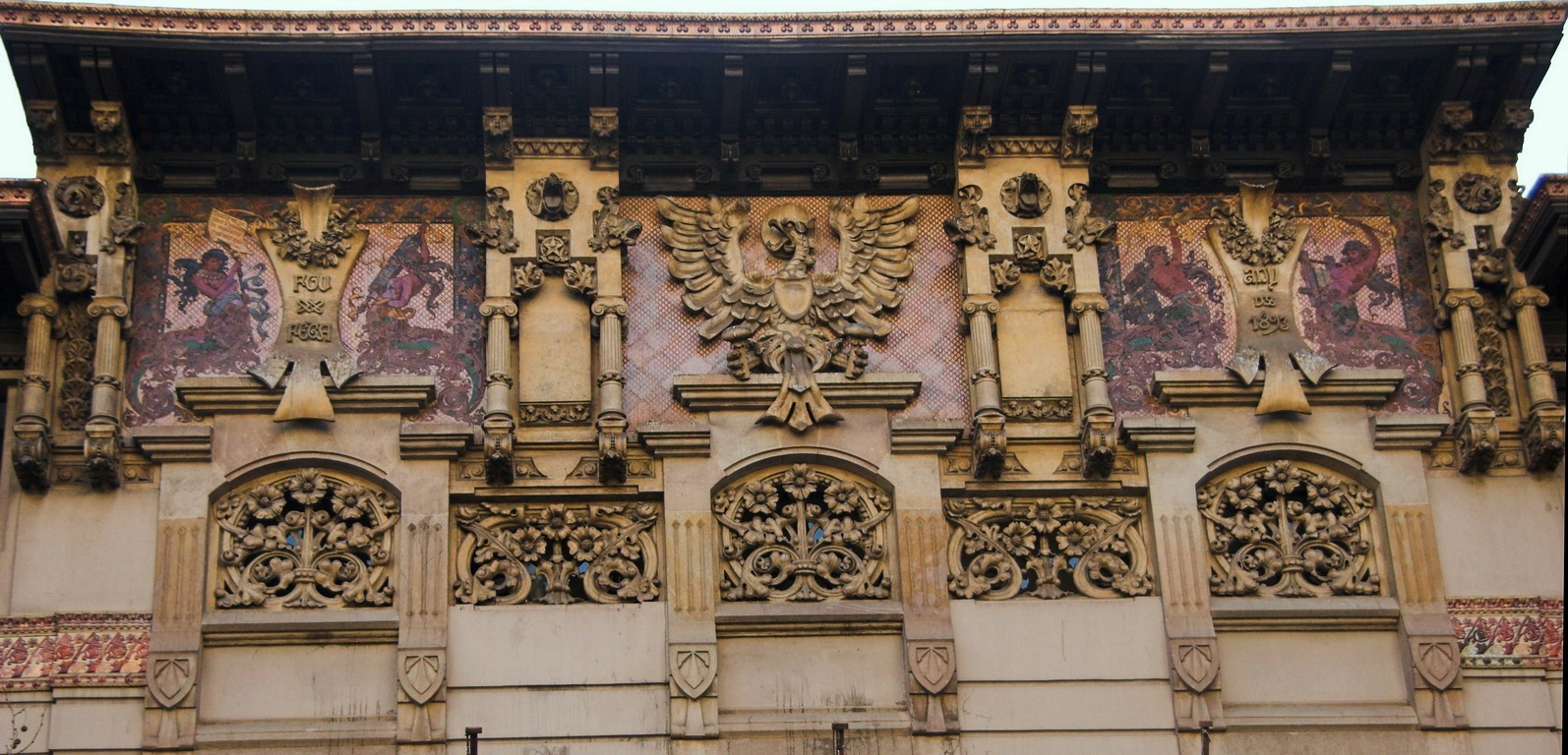 Palau Ramon Montaner (Barcelona-Catalunya), obra de Lluís Domènech i Montaner 1899. C/.Mallorca 278. Vista mosaic 3er. pis.